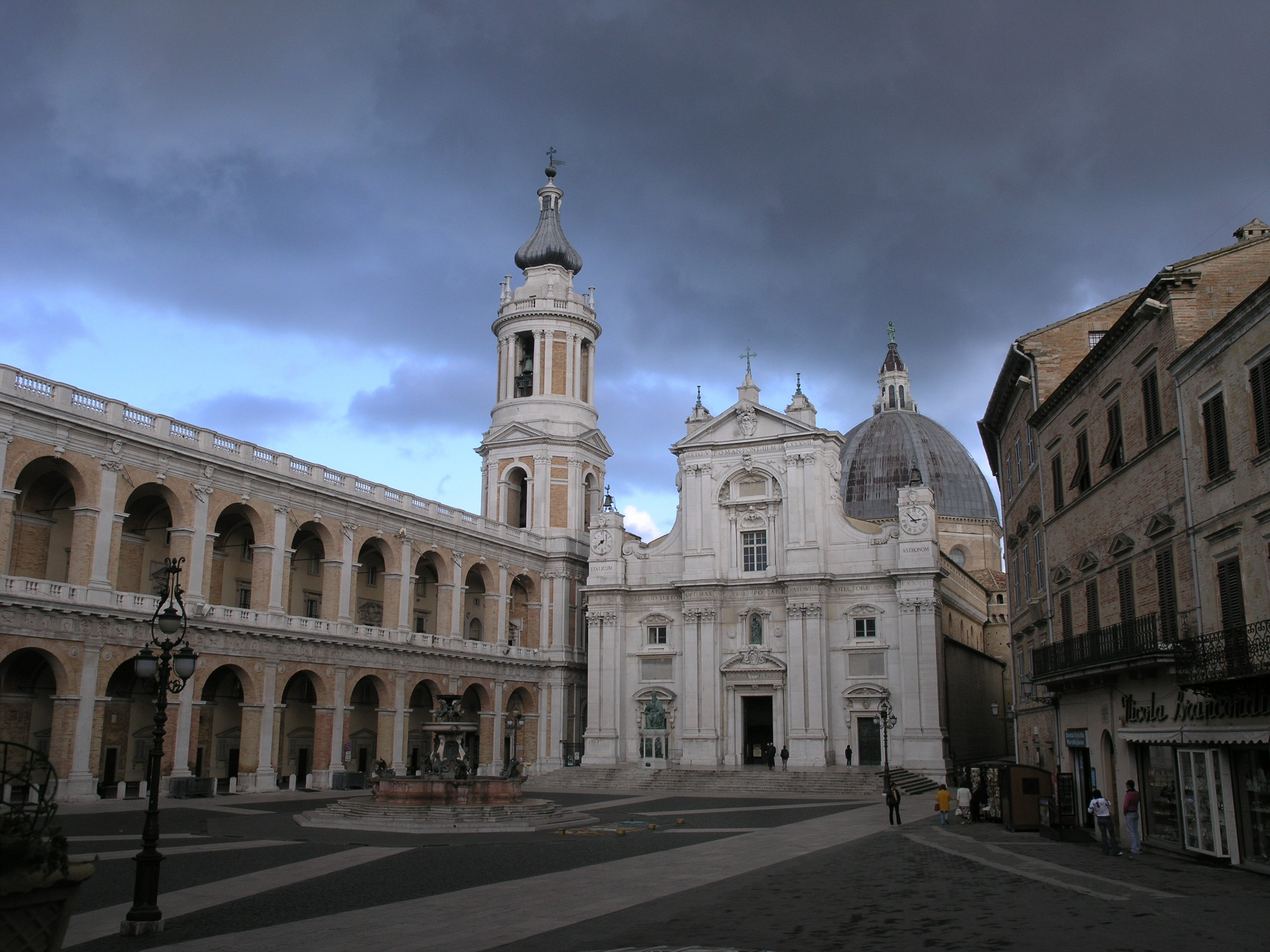 Loreto Basilika Fassade